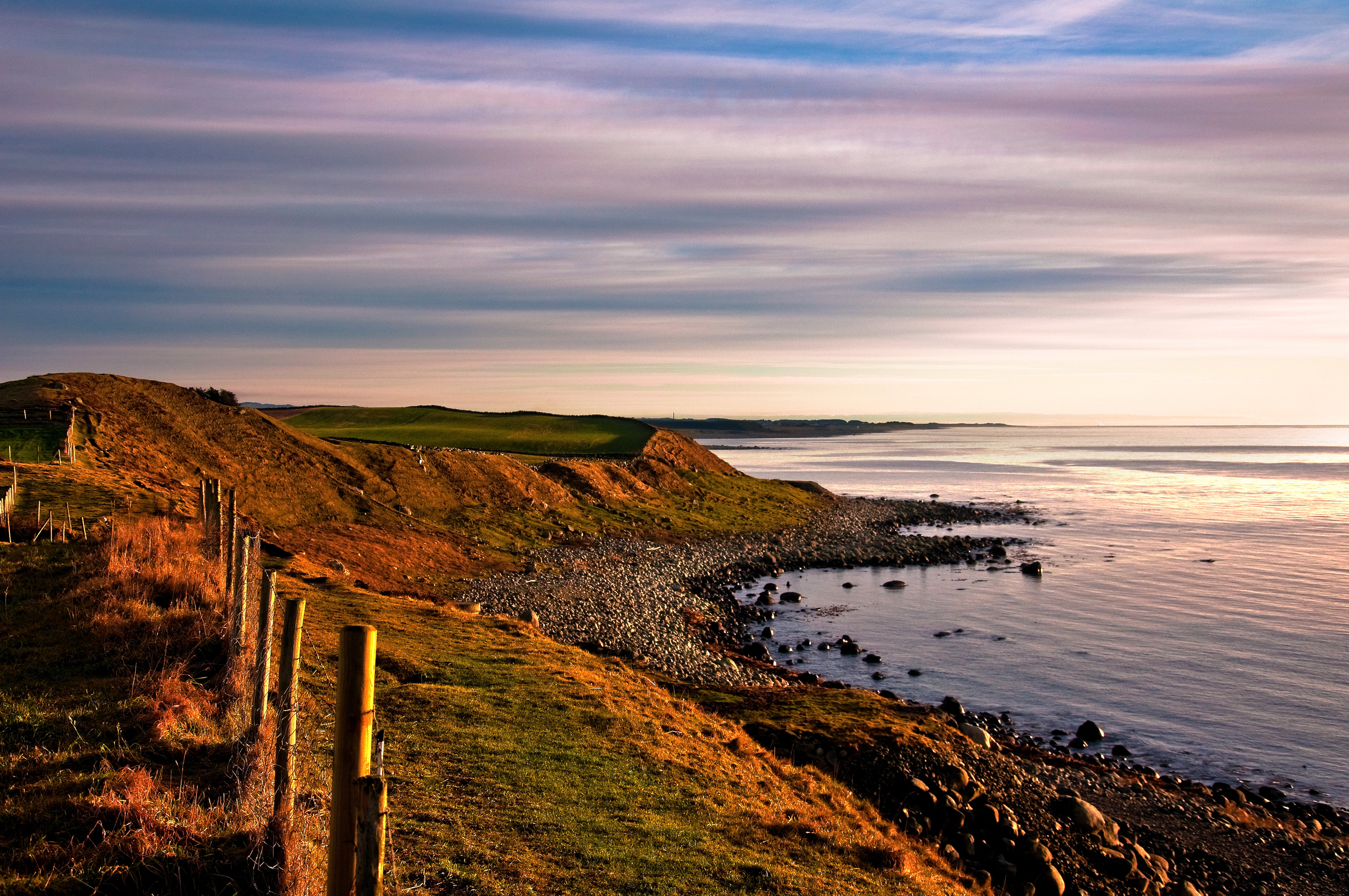 Phare d'Obrestad